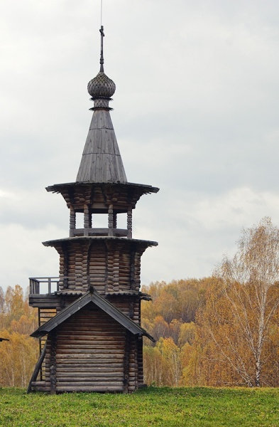 Звонница Спасо-Зашиверской церкви. 4.5 км от Новосибирского Академгородка